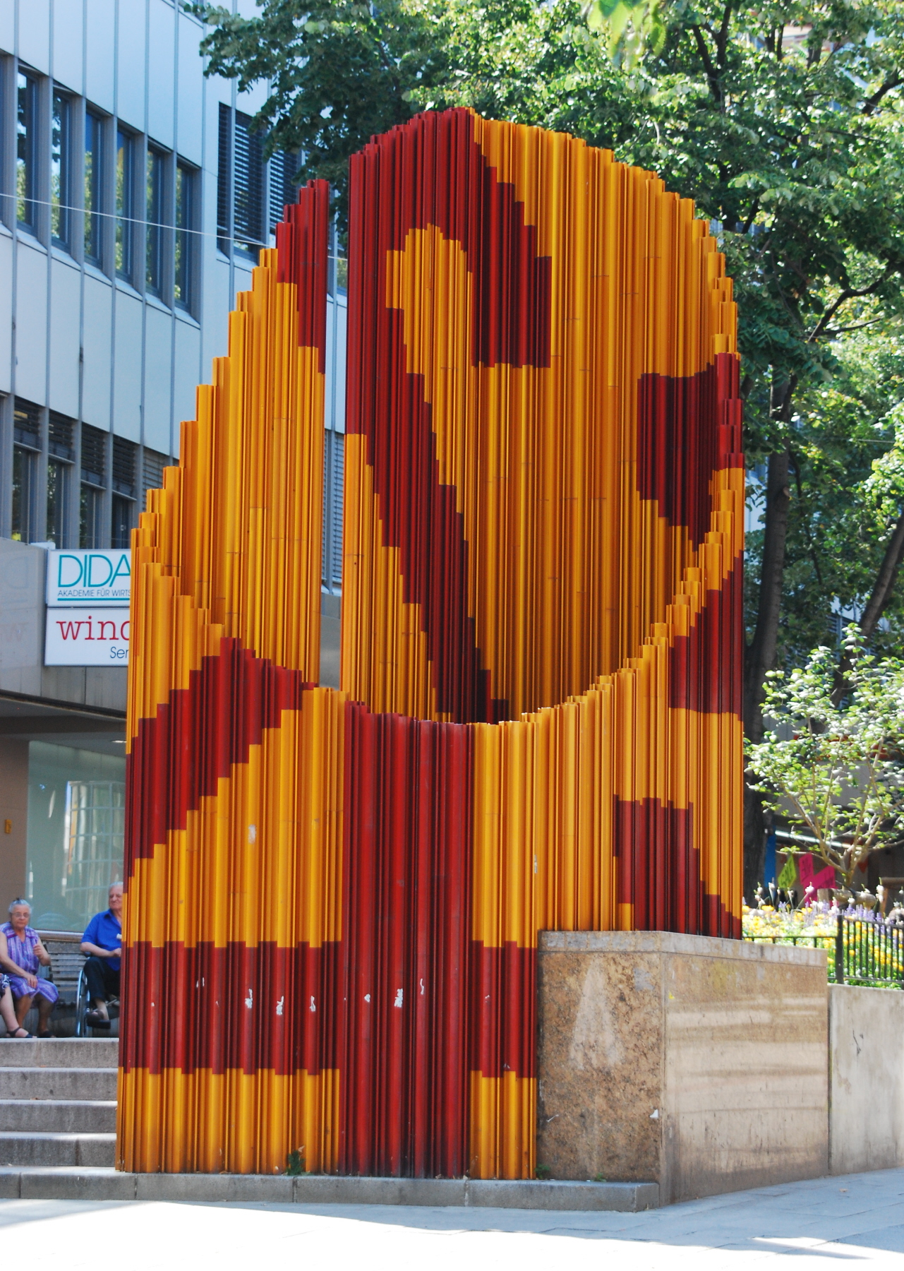 Die Skulptur TRANS/FORM von Peter Sandbichler in der Meidlinger Hauptstraße in Wien